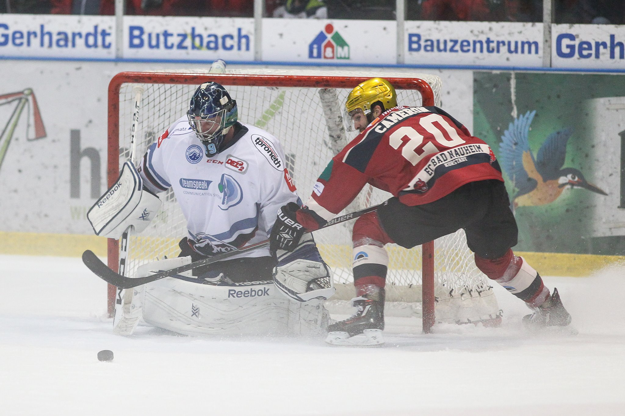 Dustin Cameron (20, Rote Teufel Bad Nauheim) scheitert an Joey Vollmer (29, Torwart SC Riessersee), DEL 2 - Rote Teufel EC Bad Nauheim vs. SC Riessersee [1]